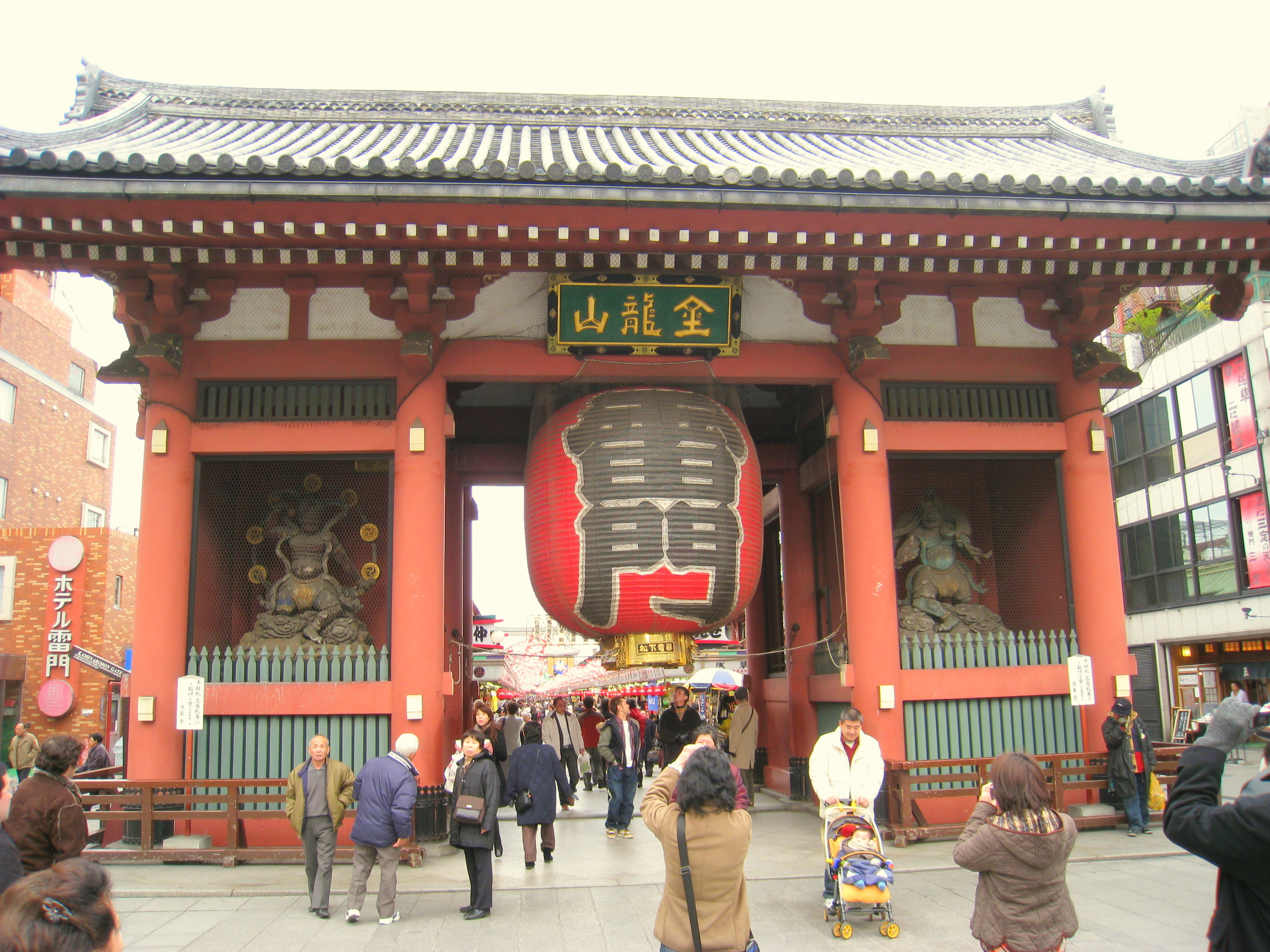 Kaminarimon (outer gate), Sensoji Temple, Asakusa, Tokyo, Japan.